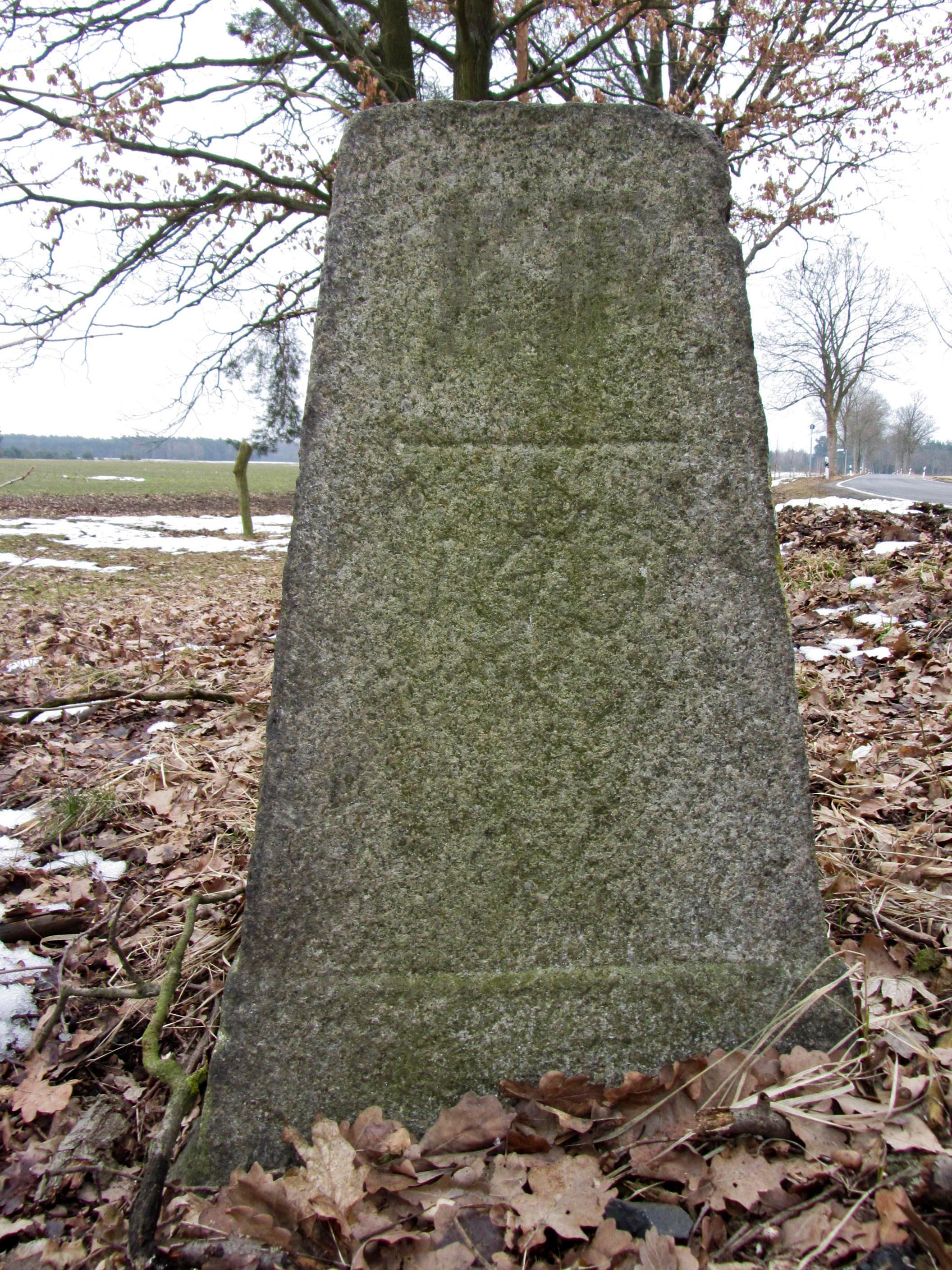 Grenzstein Nr. 145 S (Sachsen) Historische Landesgrenze Königreich Sachsen Königreich Preußen 1815 (Wiener Kongress)